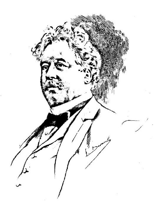 Henry Bauer, Radierung von Fernand Desmoulin (gestorben 1914), Erstdruck 1897 in Album Mariani, Paris